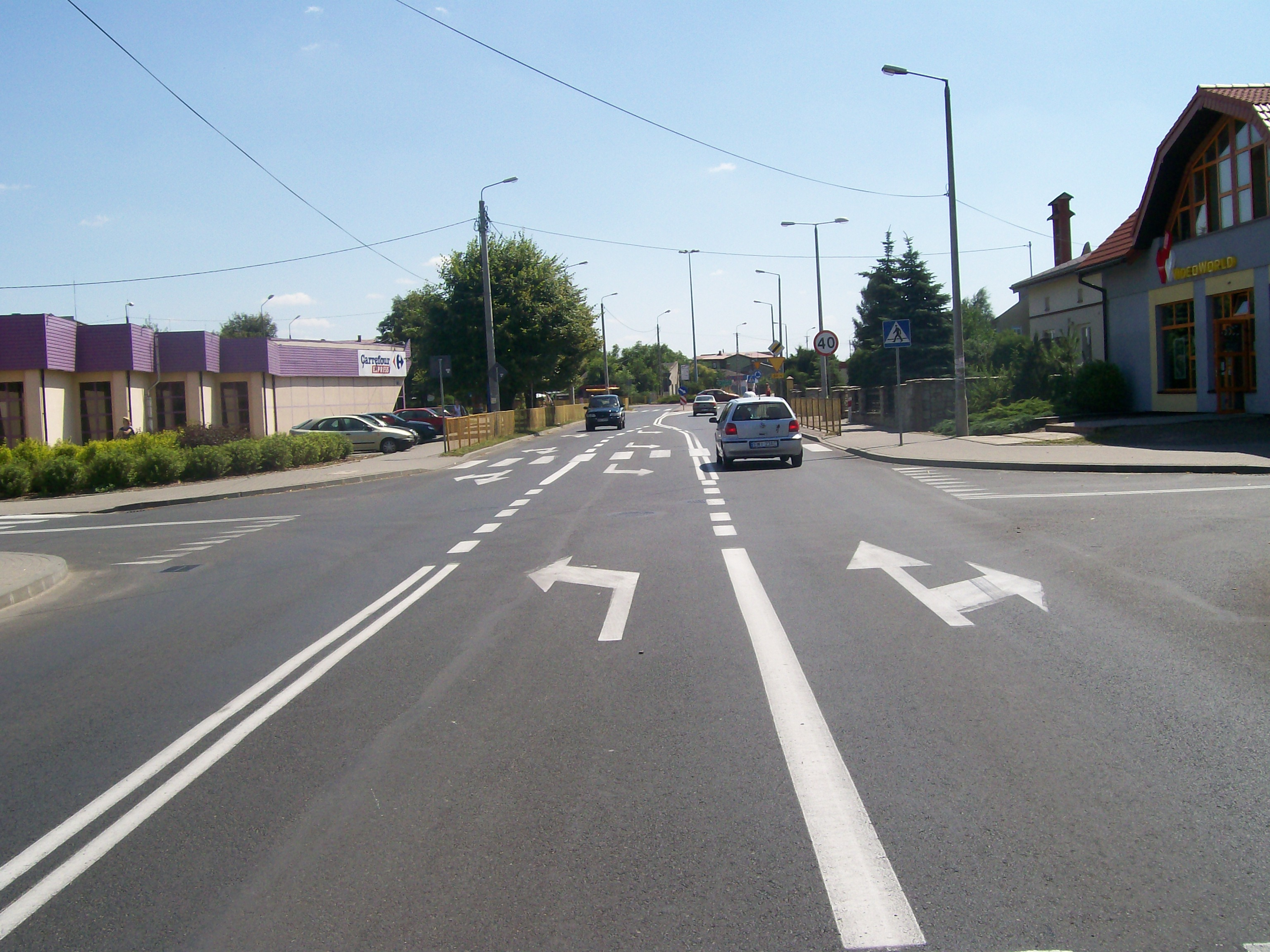 ul. 18 stycznia